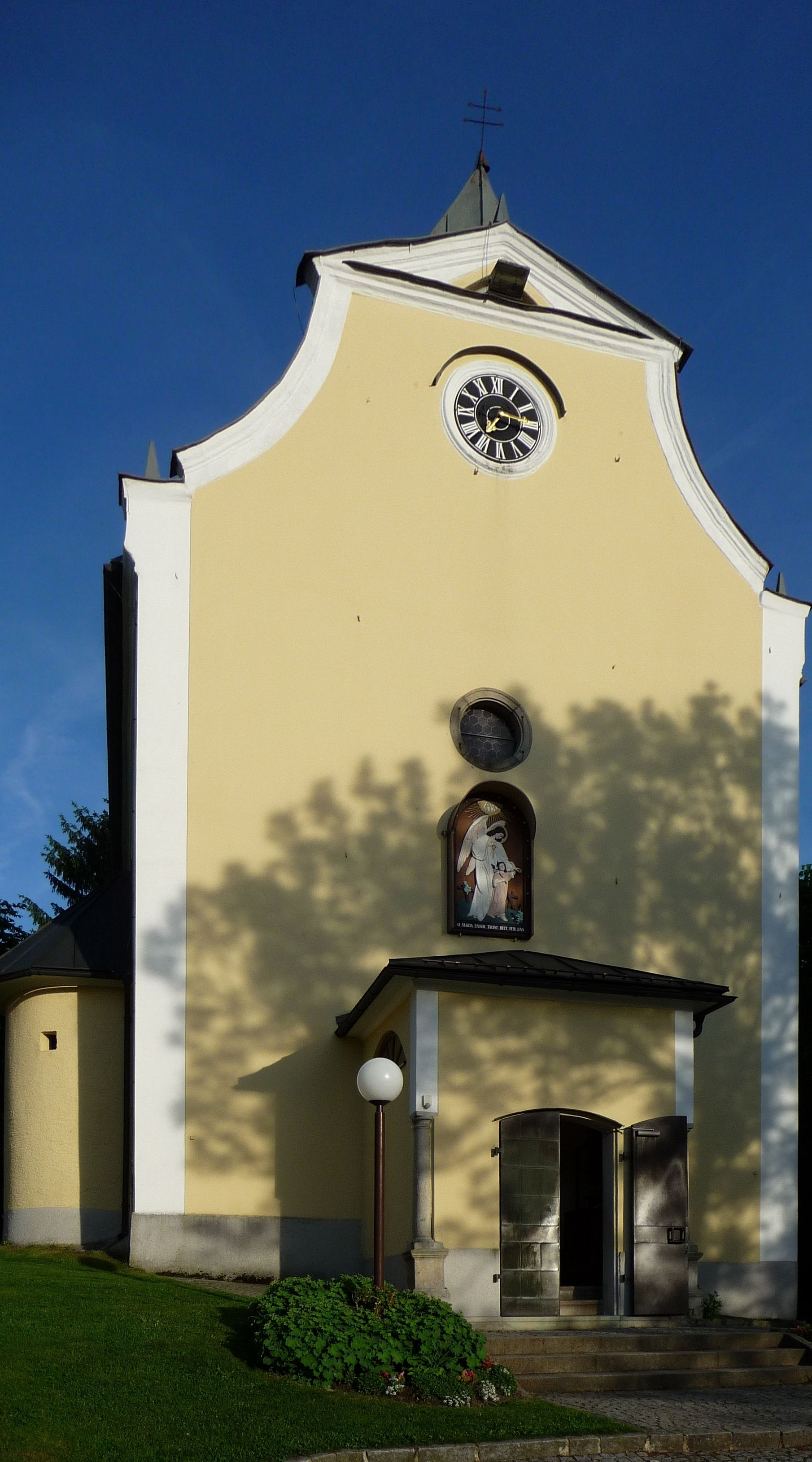 Wallfahrtskirche Maria Trost in der Gemeinde Berg bei Rohrbach OÖ